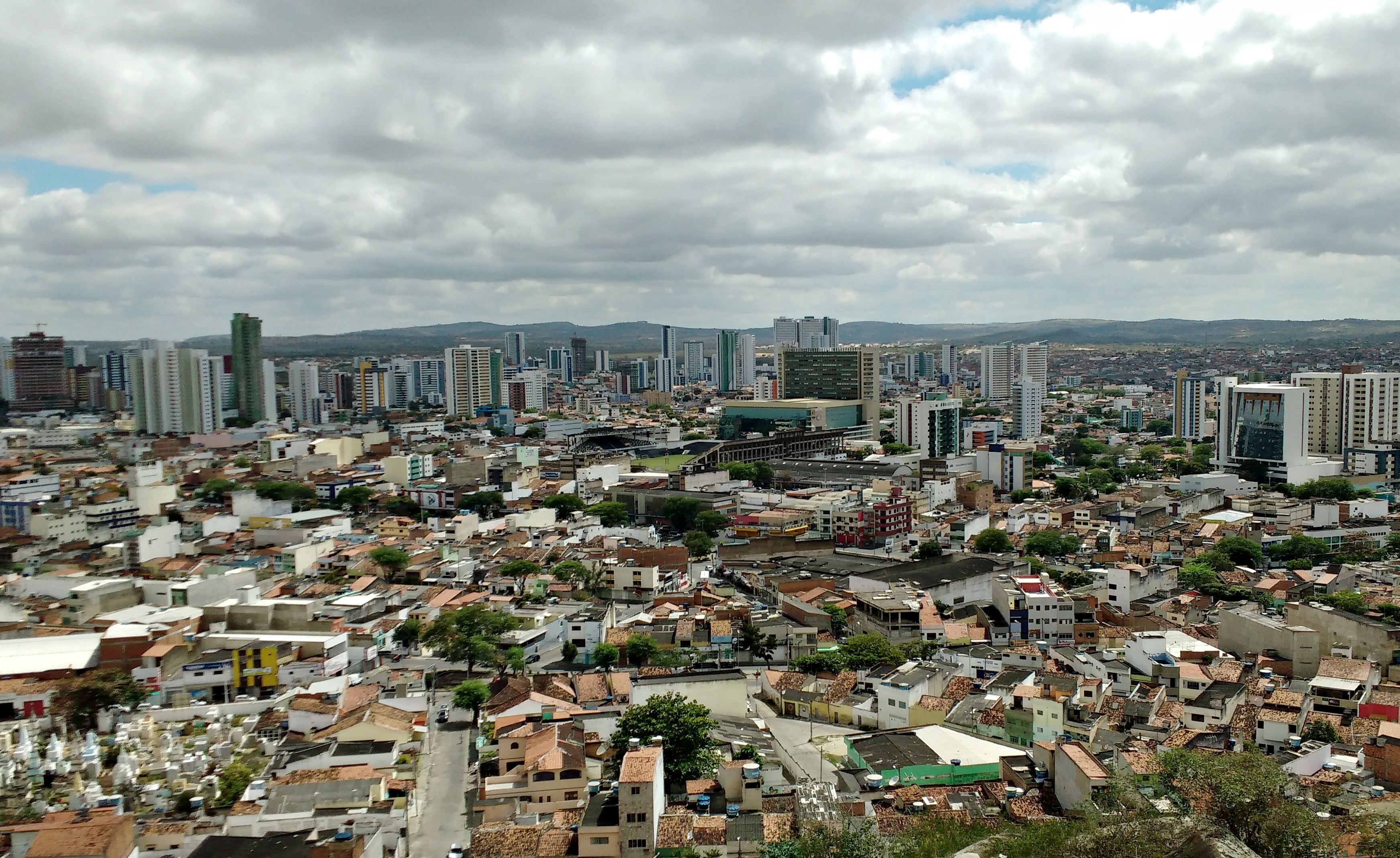 Vista parcial de Caruaru a partir do Monte Bom Jesus em setembro de 2016.